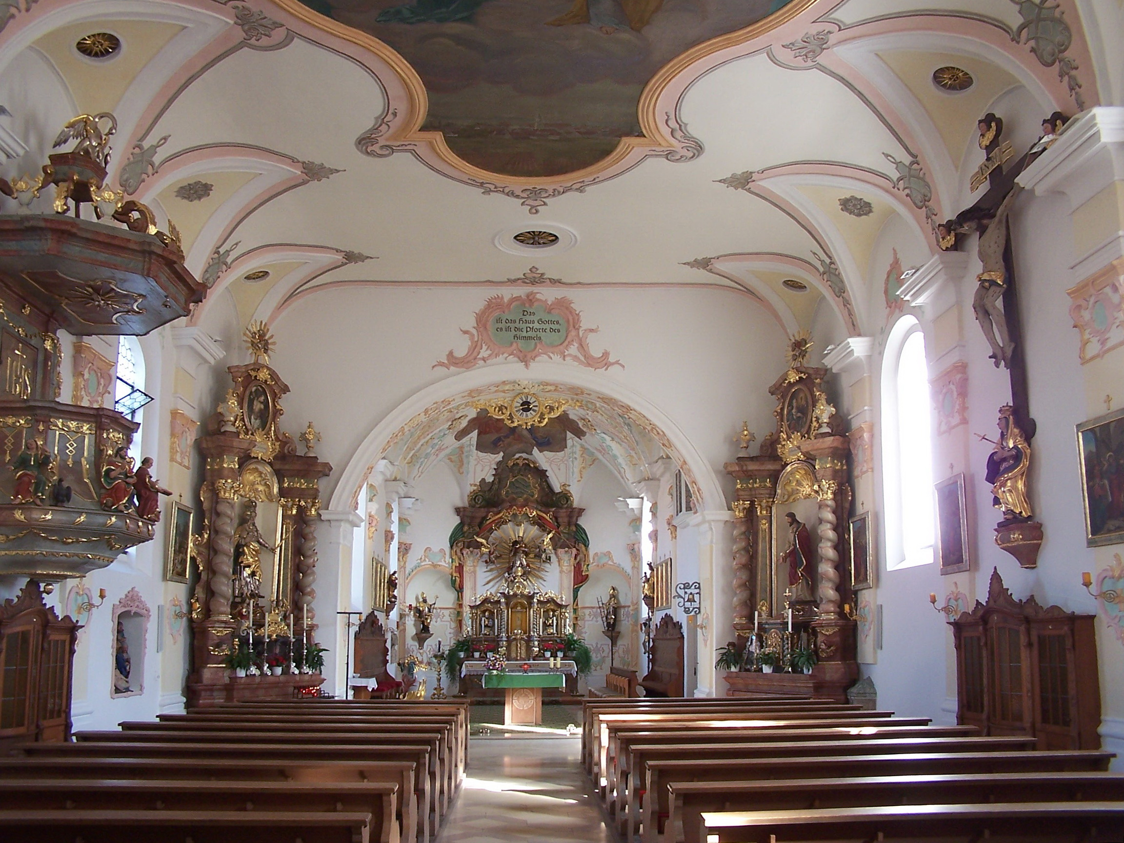 Langquaid Marktplatz 14. Katholische Pfarrkirche St. Jakob d. Ä. Saalkirche mit Steildach, eingezogenem Rechteckchor und Chorscheitelturm, Portalvorhalle nach Süden, Chor und Turm im Kern romanisch, 13. Jahrhundert, Langhaus spätgotisch, 15. Jahrhundert, Barockisierung der Anlage um 1740, Verlängerung nach Westen, 1917; mit Ausstattung.